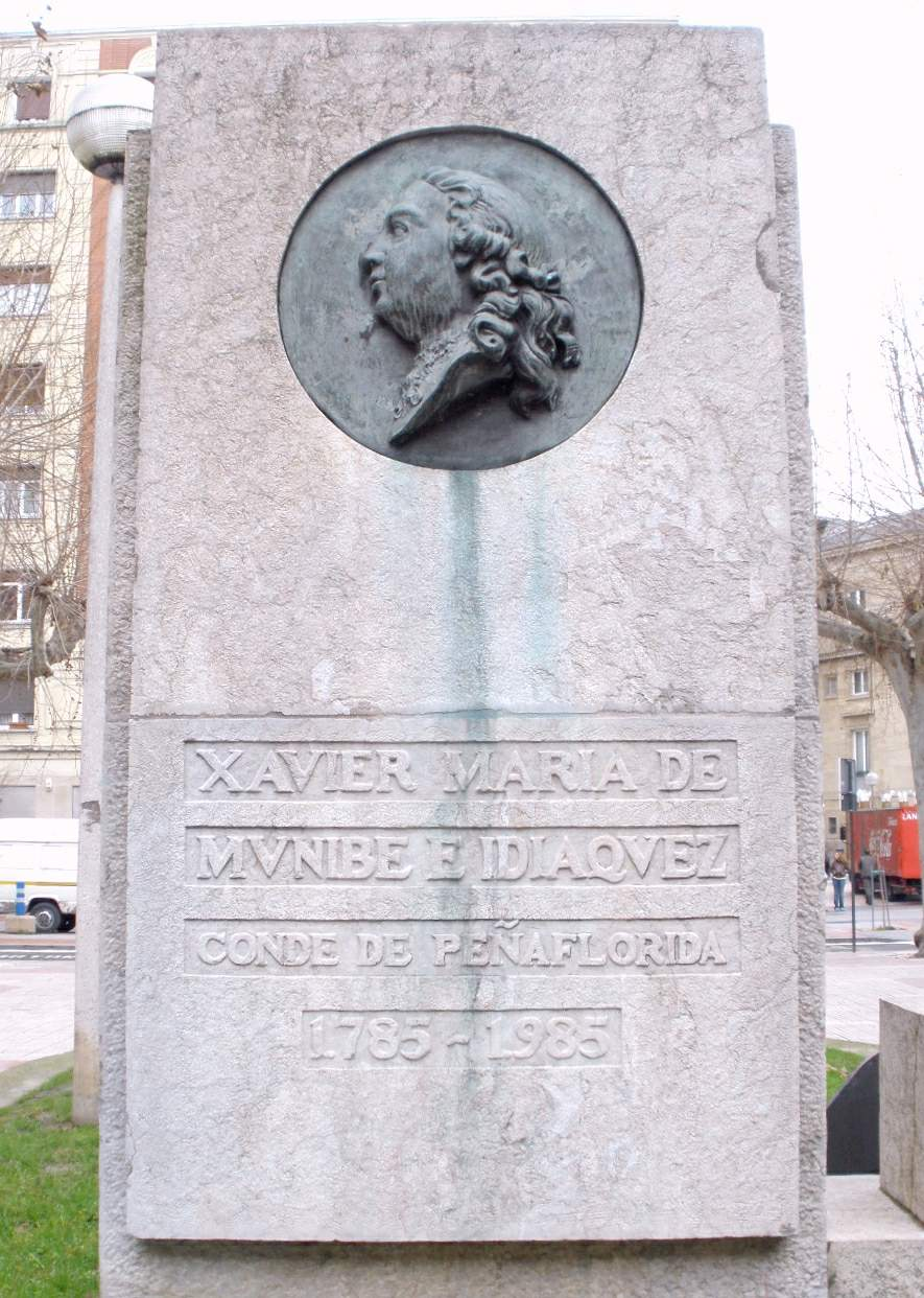 Vitoria - Plaza del Conde Peñaflorida, Monumento a Xavier María de Munibe e Idiáquezal, Conde de Peñaflorida